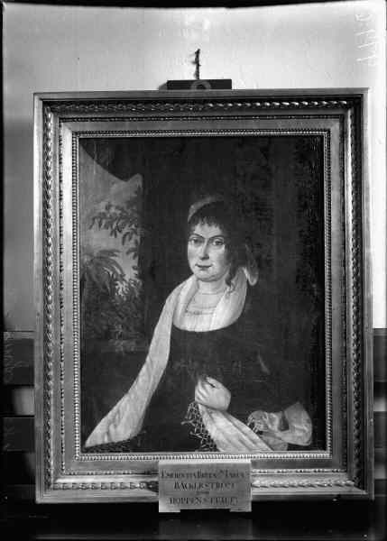 Oljemålning, porträtt av prostinnan Bäckerström. Kategori: (09) Minnestavlor, minnesstenarOljemålning, porträtt av prostinnan Bäckerström.